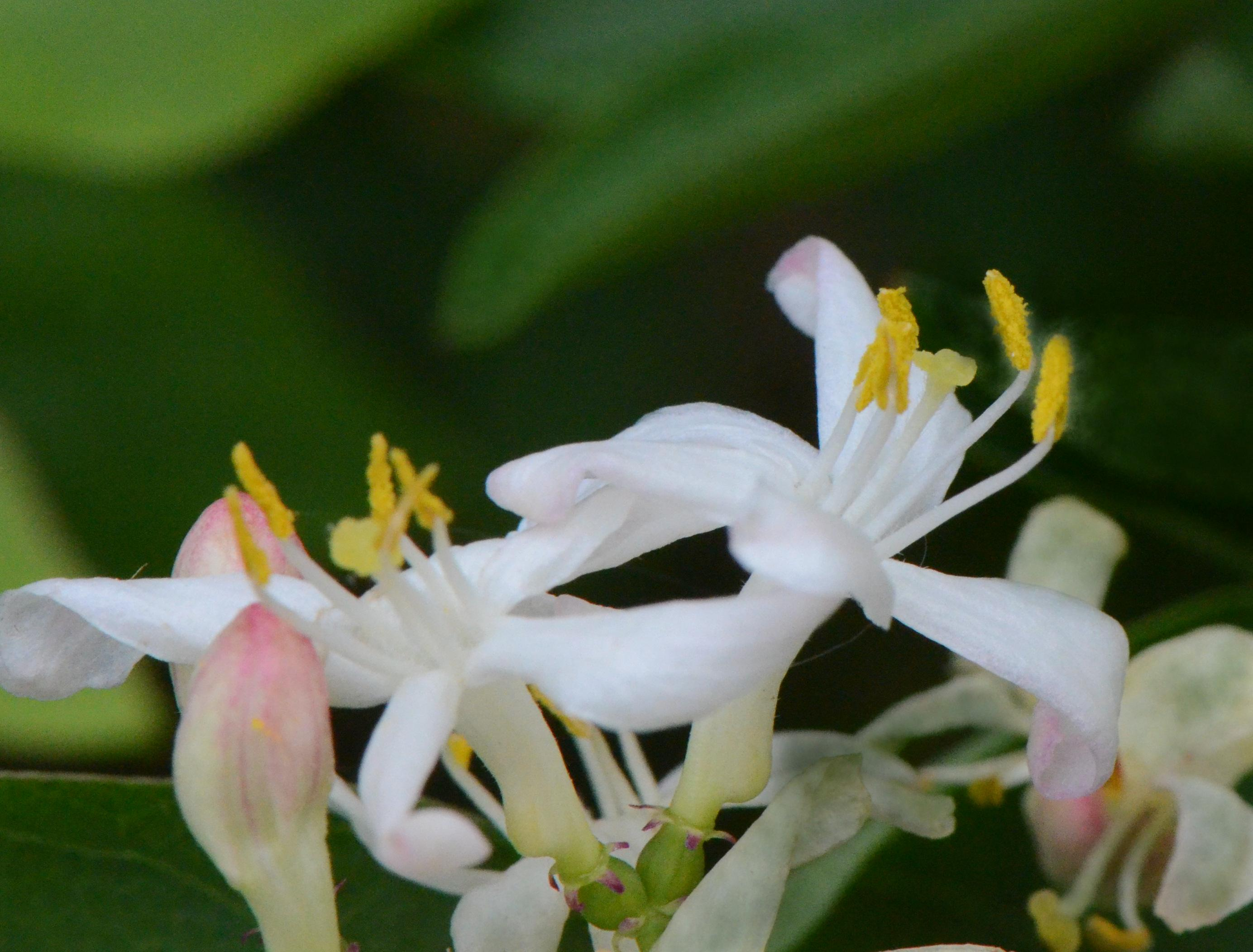 Lonicera tatarica, fleur, Jardin des Plantes de Paris